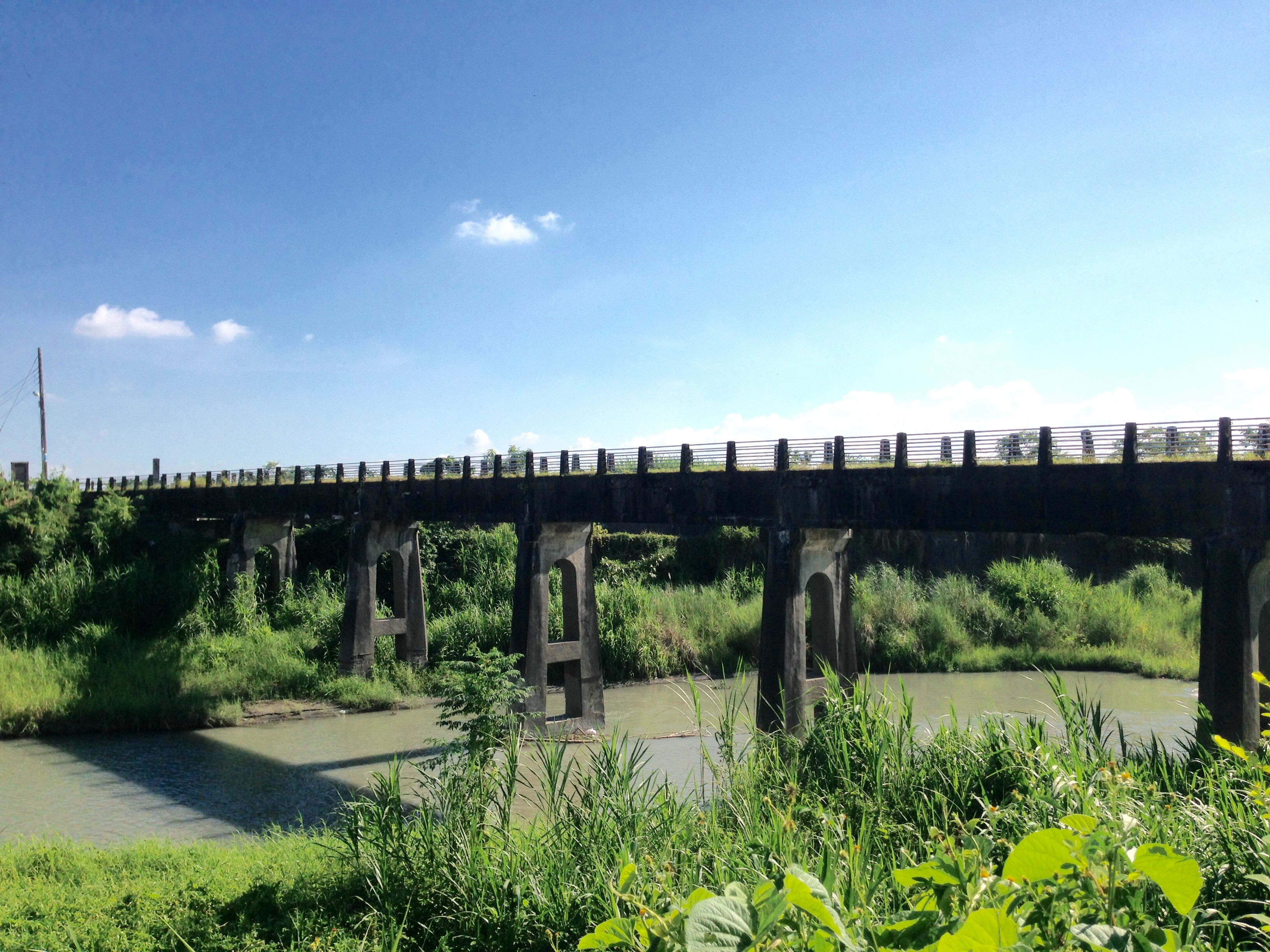 美濃區水橋